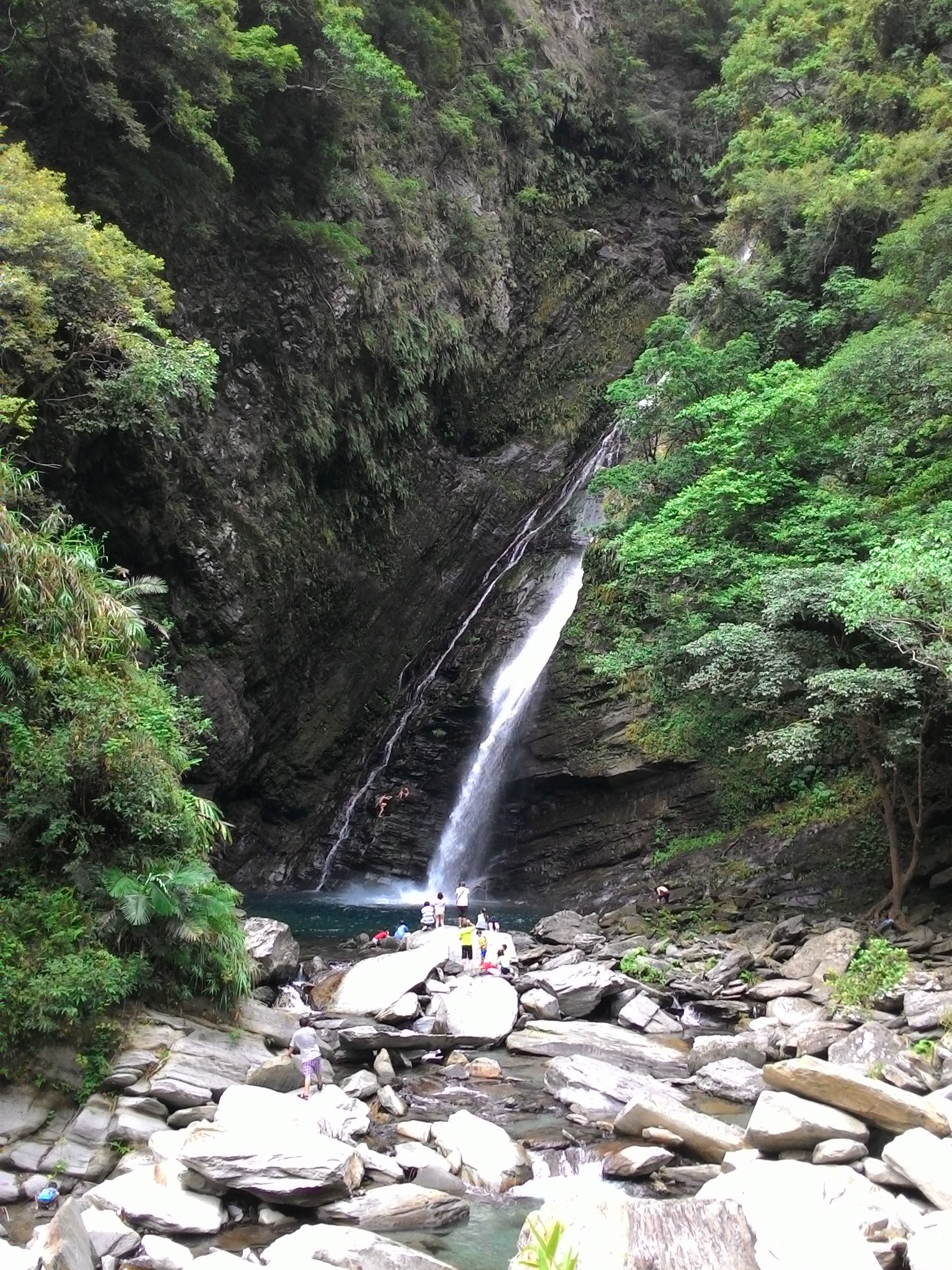 澳花瀑布戲水。